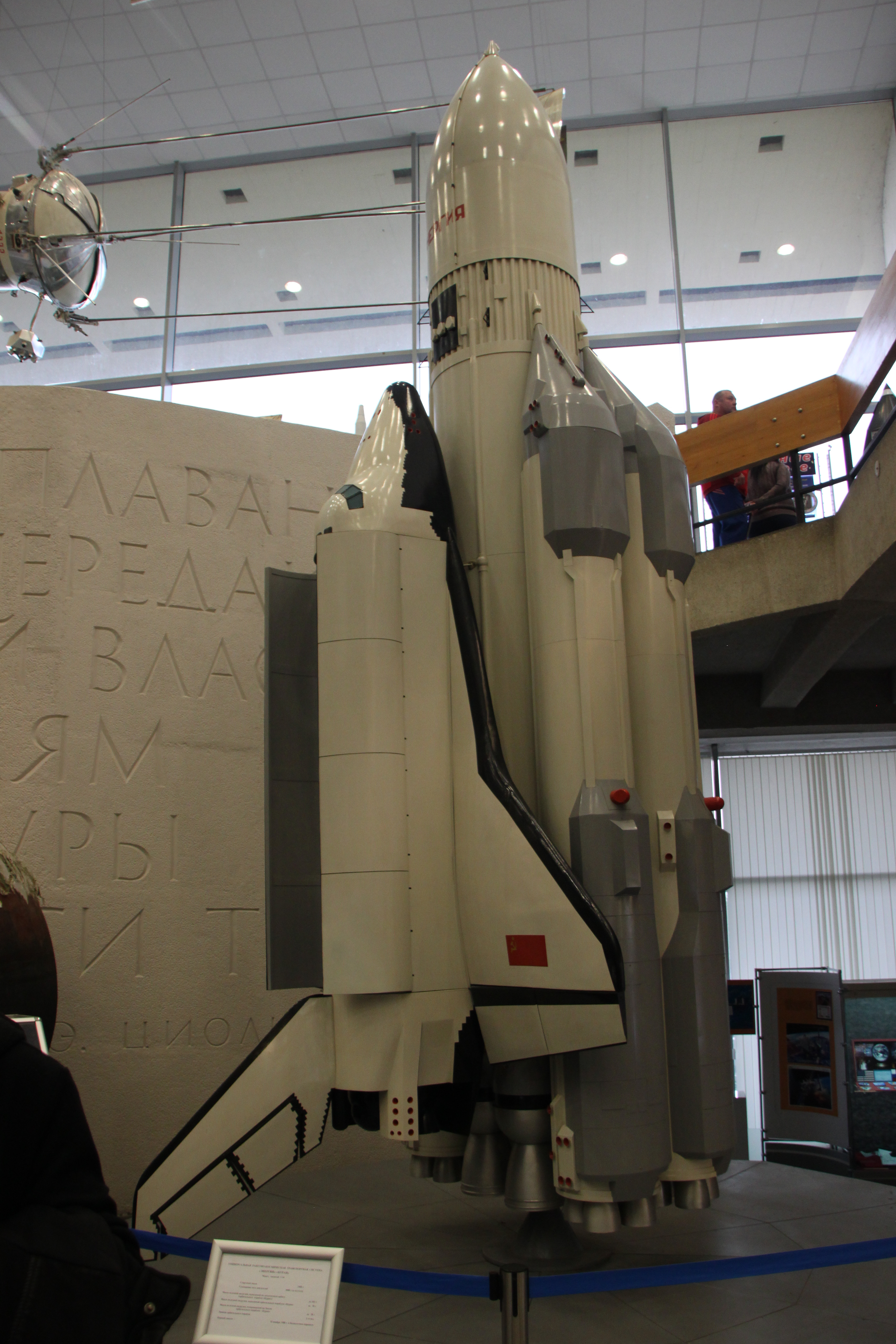 Викиэкспедиция в Калугу 11 июня 2016 года